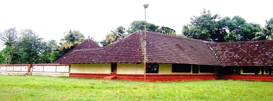 ചൊവ്വാരം ചിദംബരേശ്വര ക്ഷേത്രം